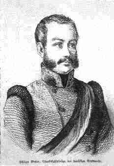 Johann Philipp Becker (1809-1886), Revolutionär 1848/49 (zeitg. Darstellung)